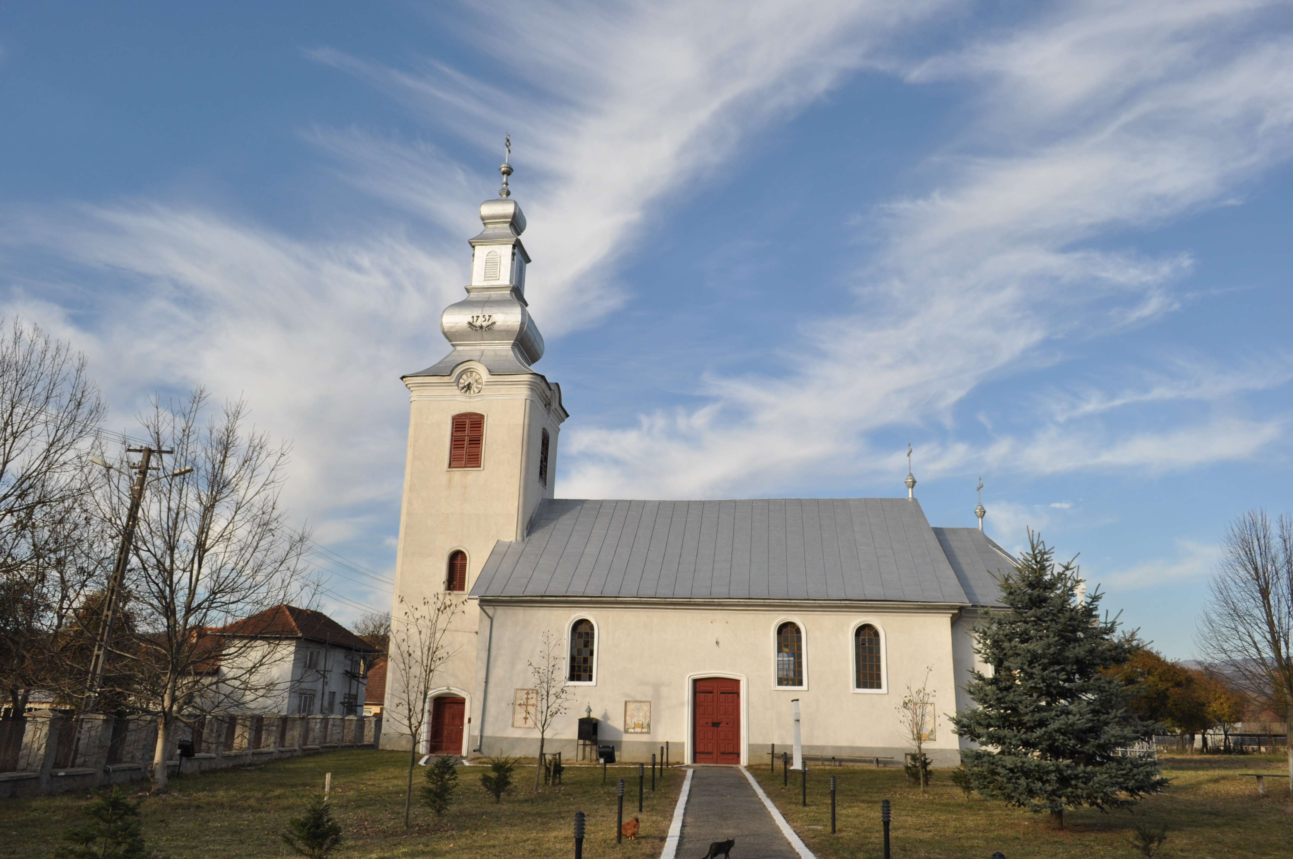 Biserica „Nașterea Născătoarei de Dumnezeu" din Hălmagiu, județul Arad